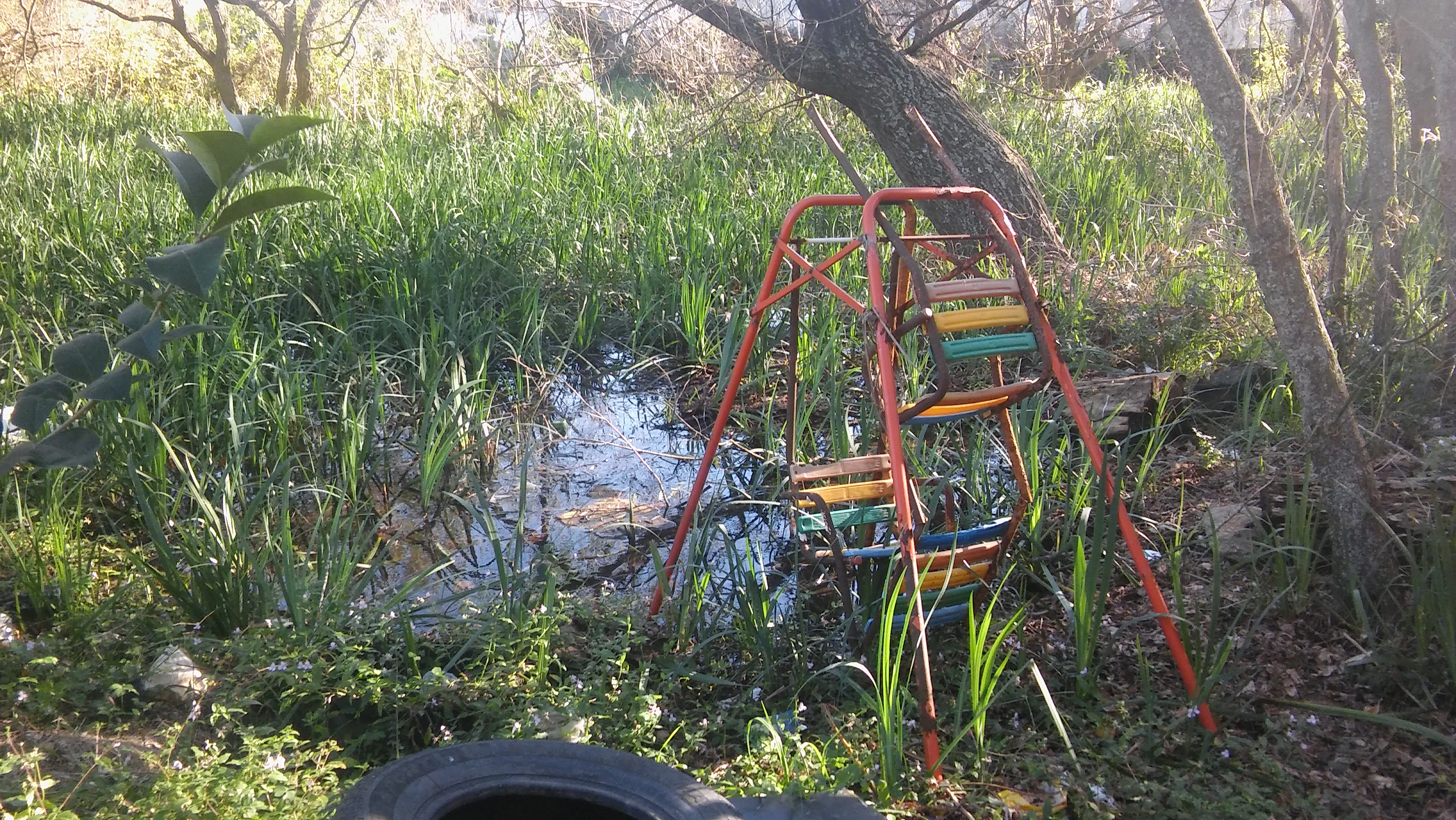 Arroyo Santo Domingo. Era un lugar libre de contaminación, pero se perdió por culpa de la mano del hombre. Al estar en ese lugar, uno puede darse cuenta de la "importancia" que le dan algunos a la naturaleza.